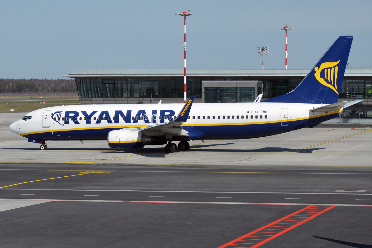 Ryanair, EI-EMN, Boeing 737-8AS